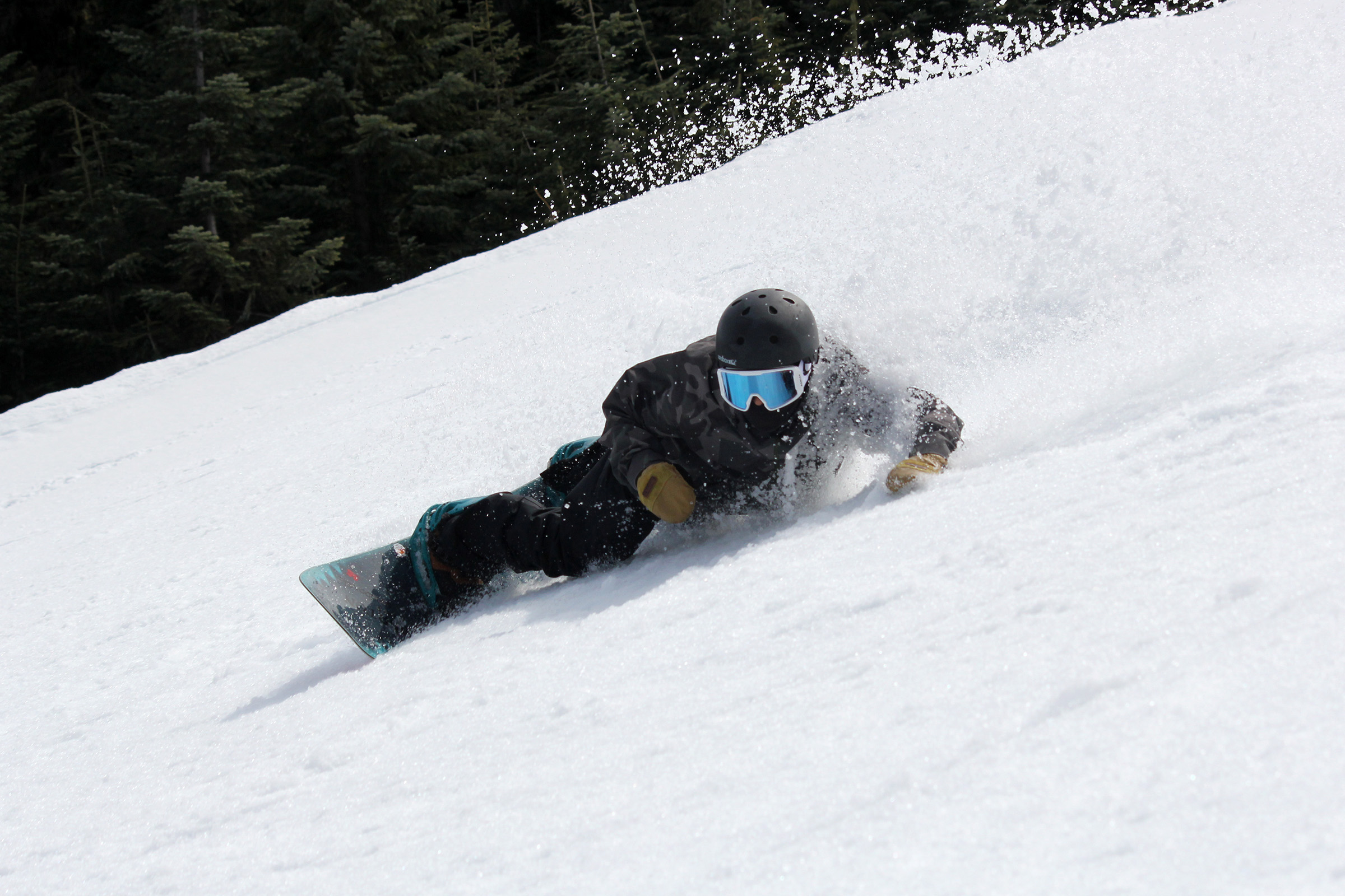 スノーボードしている写真。